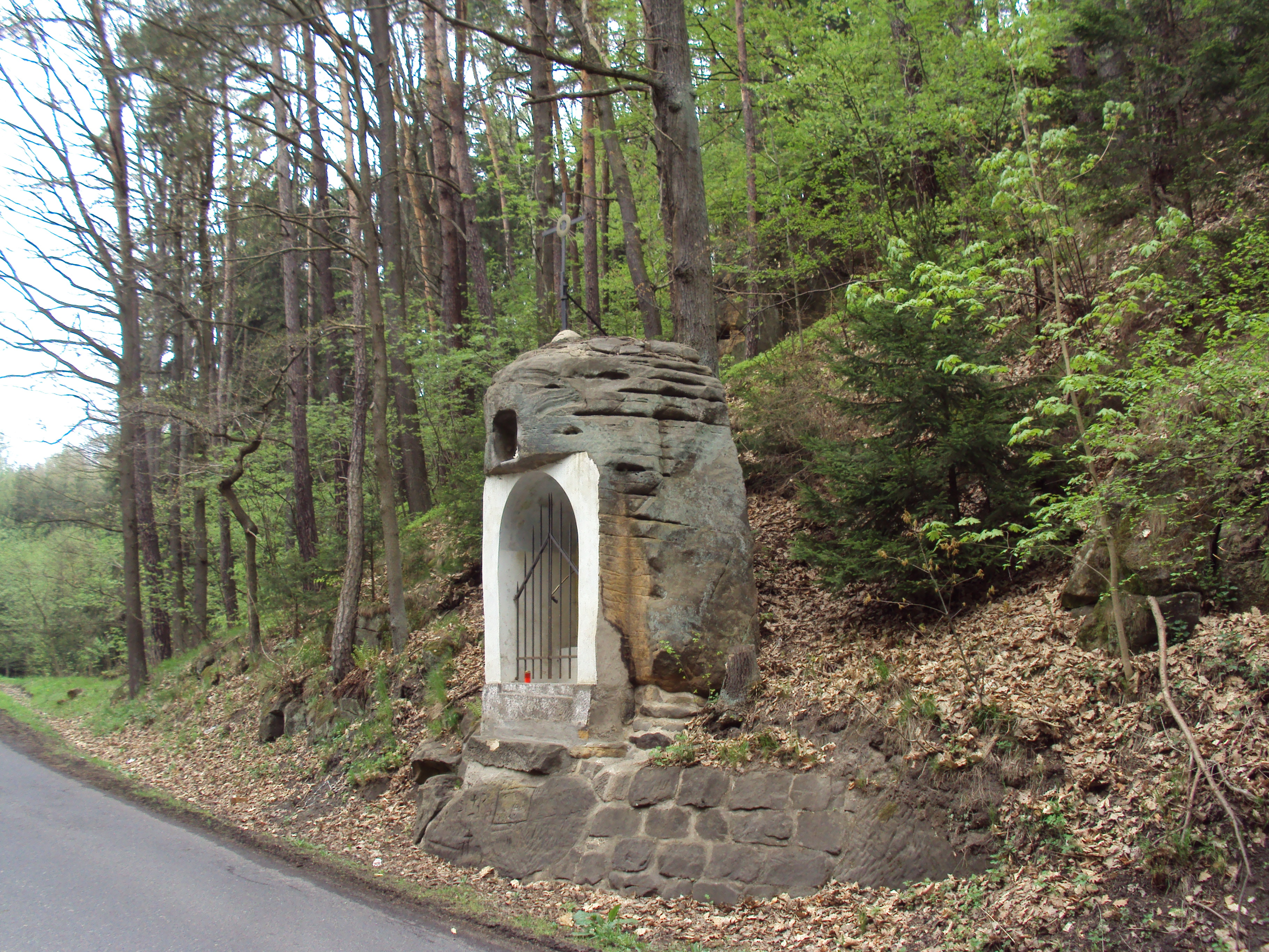 Křižek u silnice od Zákup do Lasvic pod Ovčím vrchem